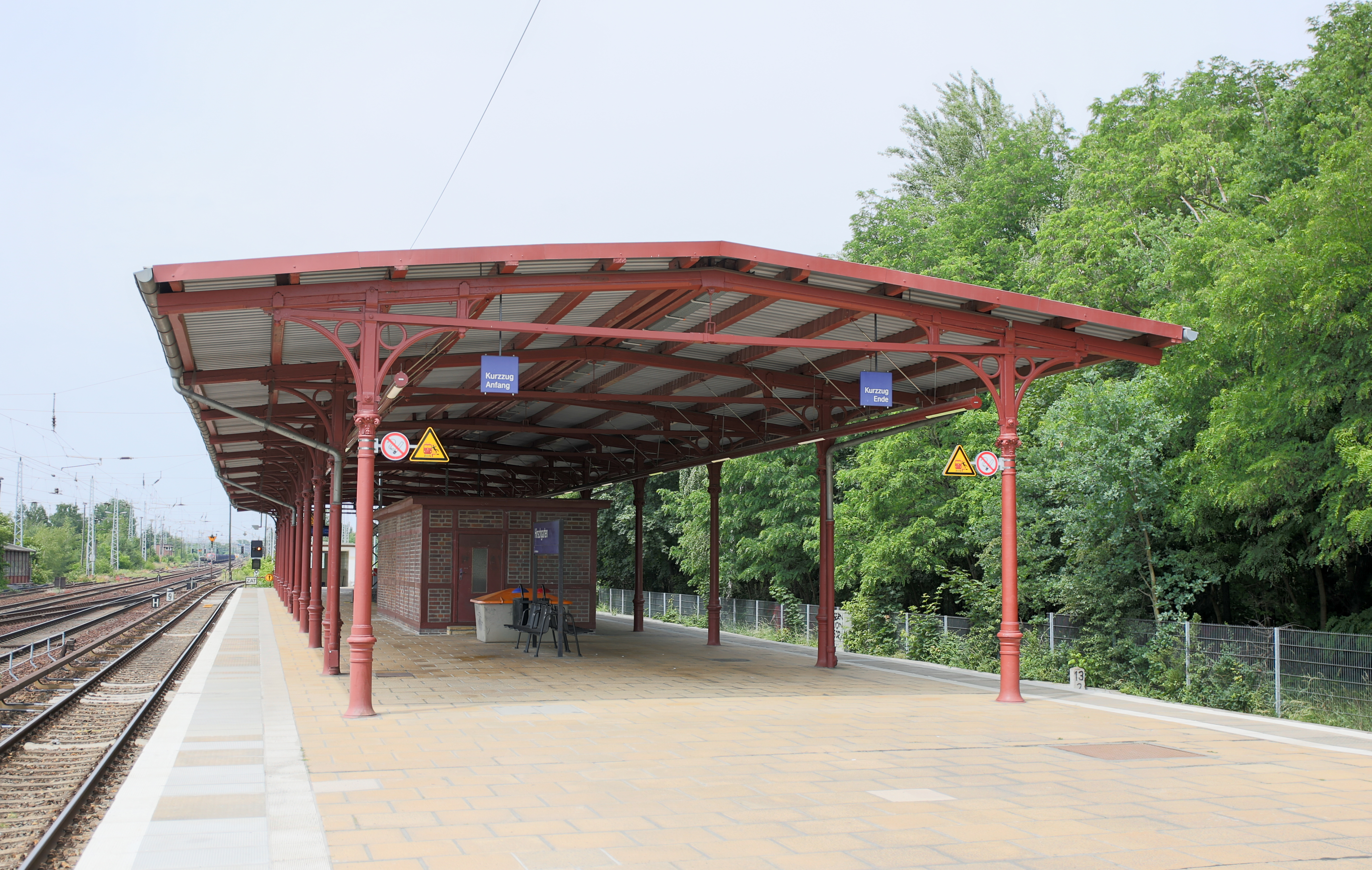 Berliner S-Bahn Haltestelle Hirschgarten